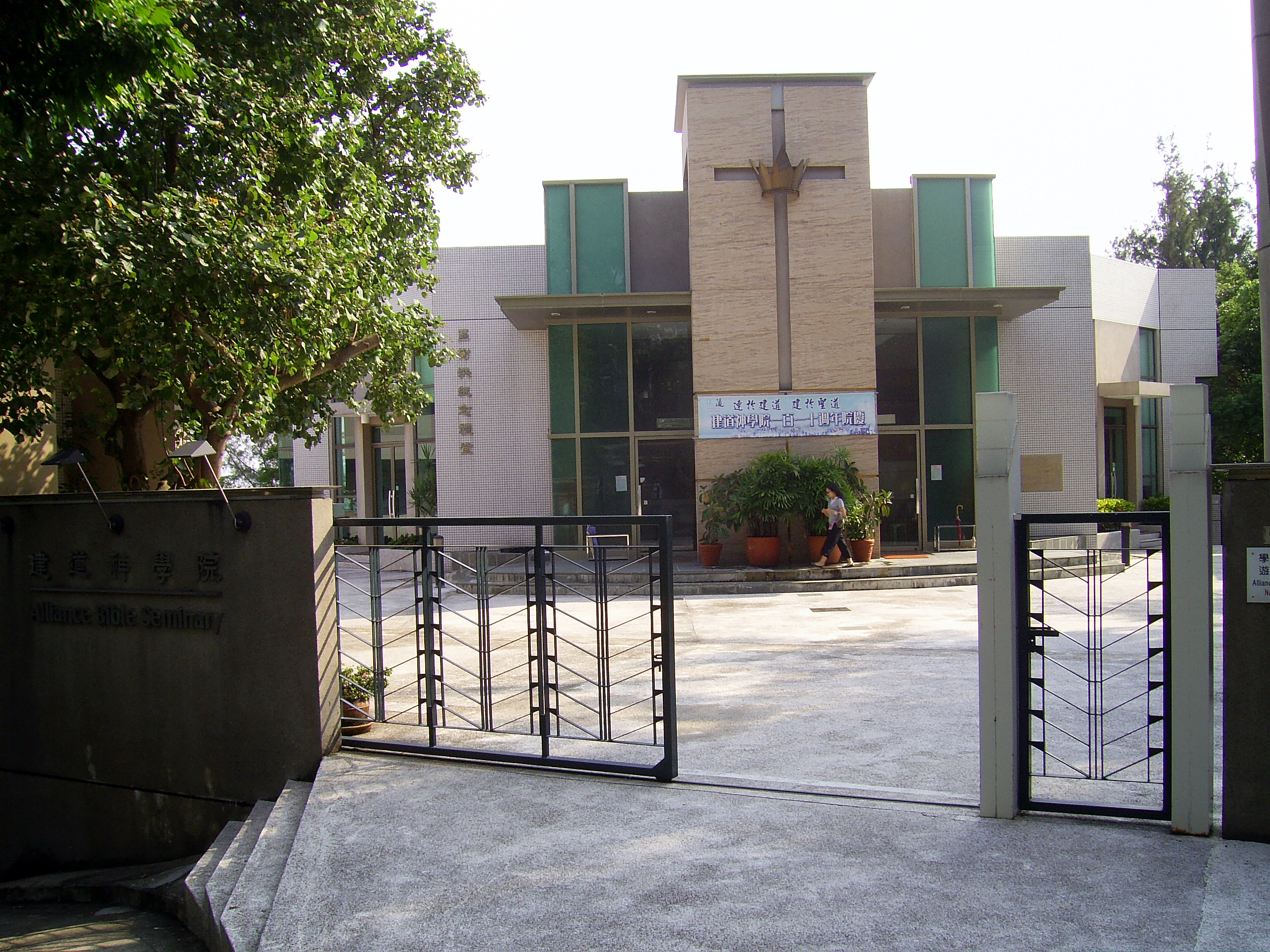 中文（香港）: 建道神學院區樹洪紀念禮堂